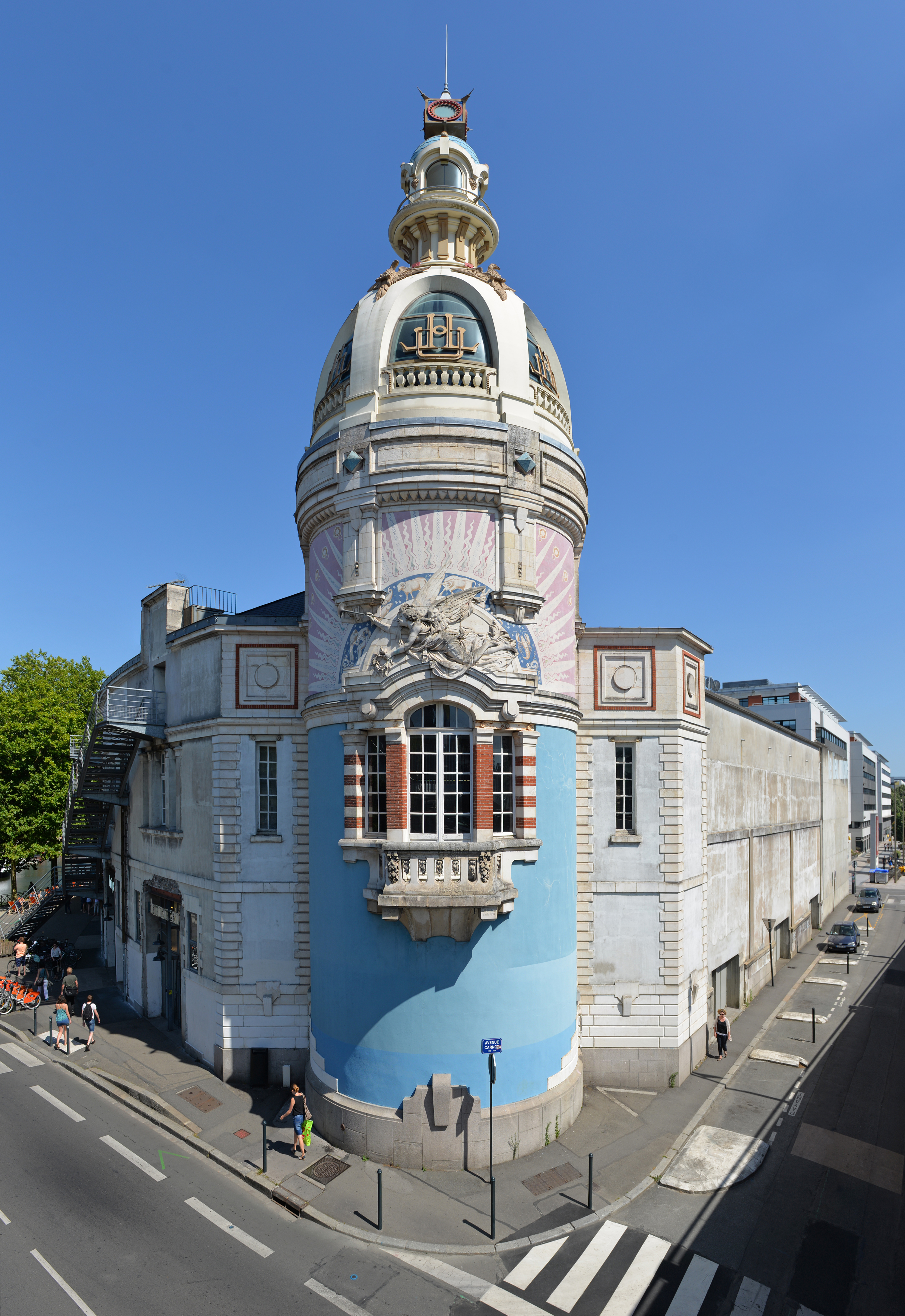 Panorama vertical de la Tour LU à Nantes.